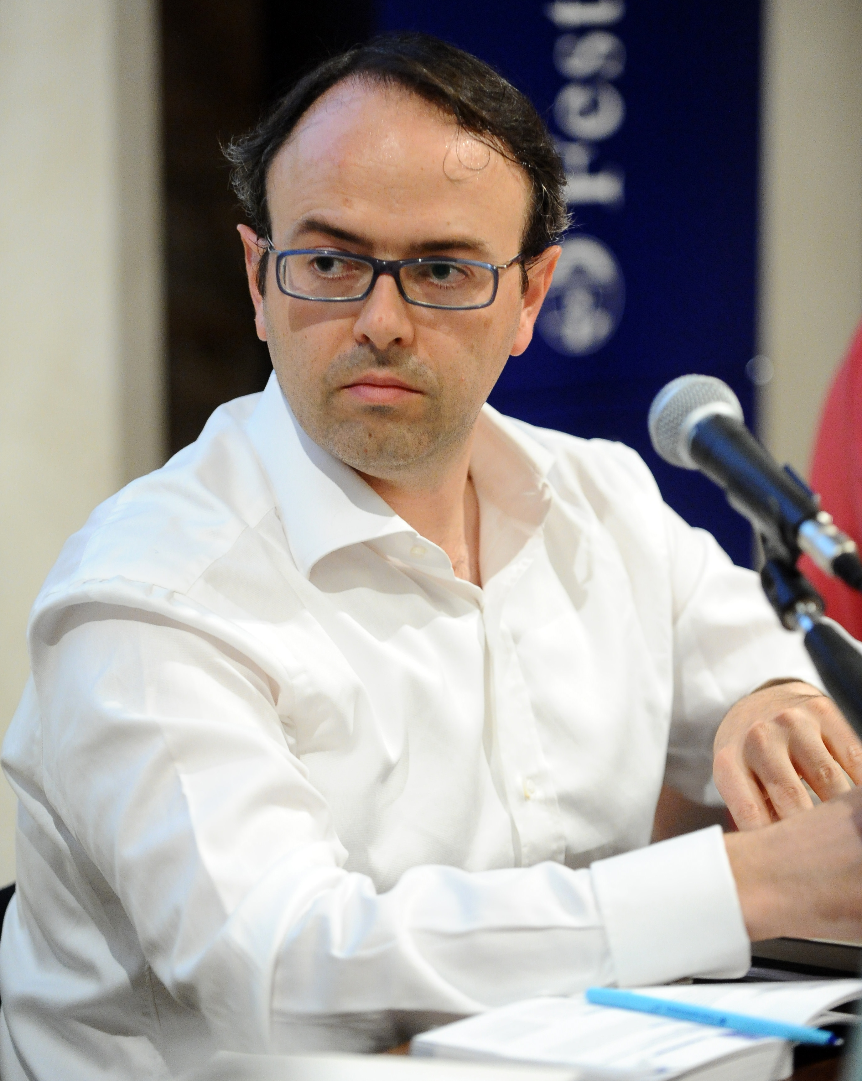 Daniele Piccini a Mantova per il Festivaletteratura 2012.